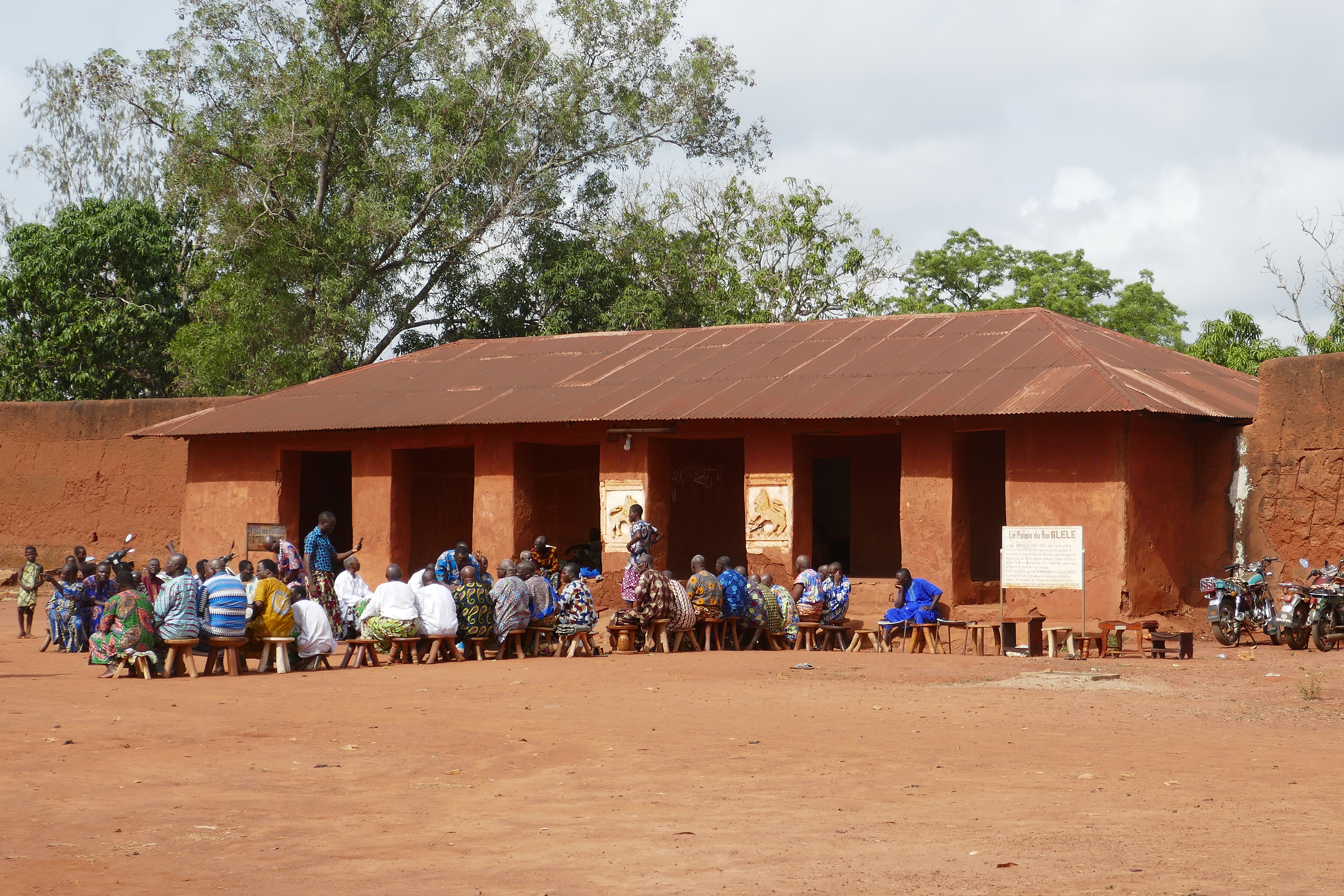 Rencontre de dignitaires au palais du roi Glèlè à Abomey (Bénin),dans l'enceinte du Musée historique.